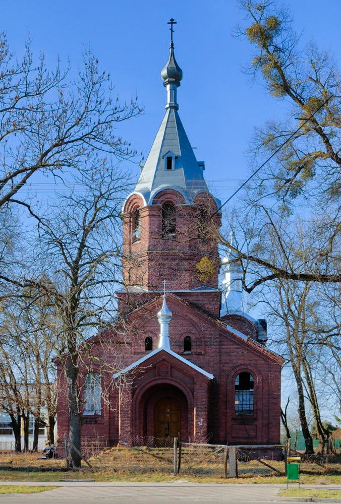 zdjęcie cerkwi